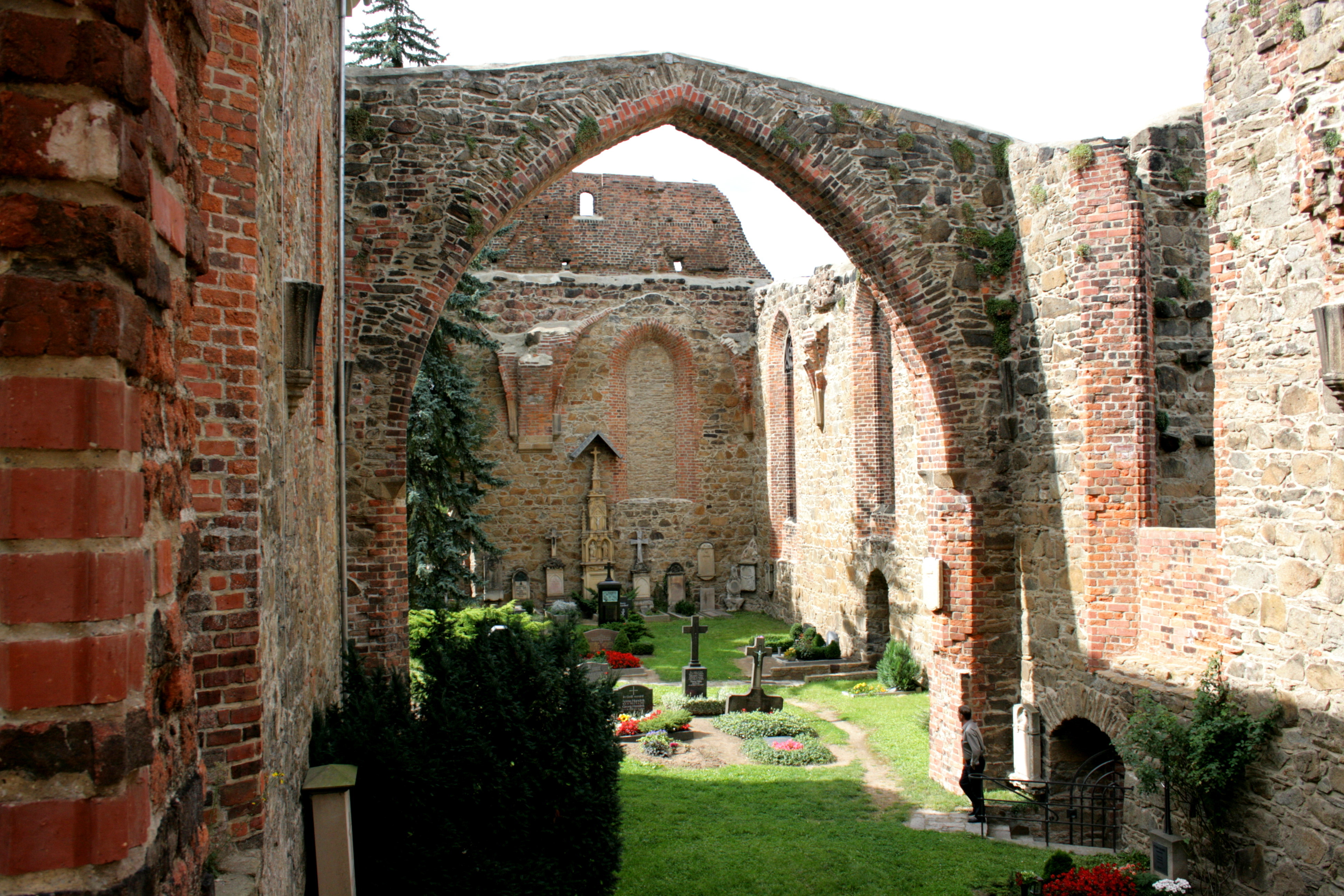 Nikolaikirche und -friedhof in Bautzen Hornjoserbsce: Na Mikławšku w Budyšinje.